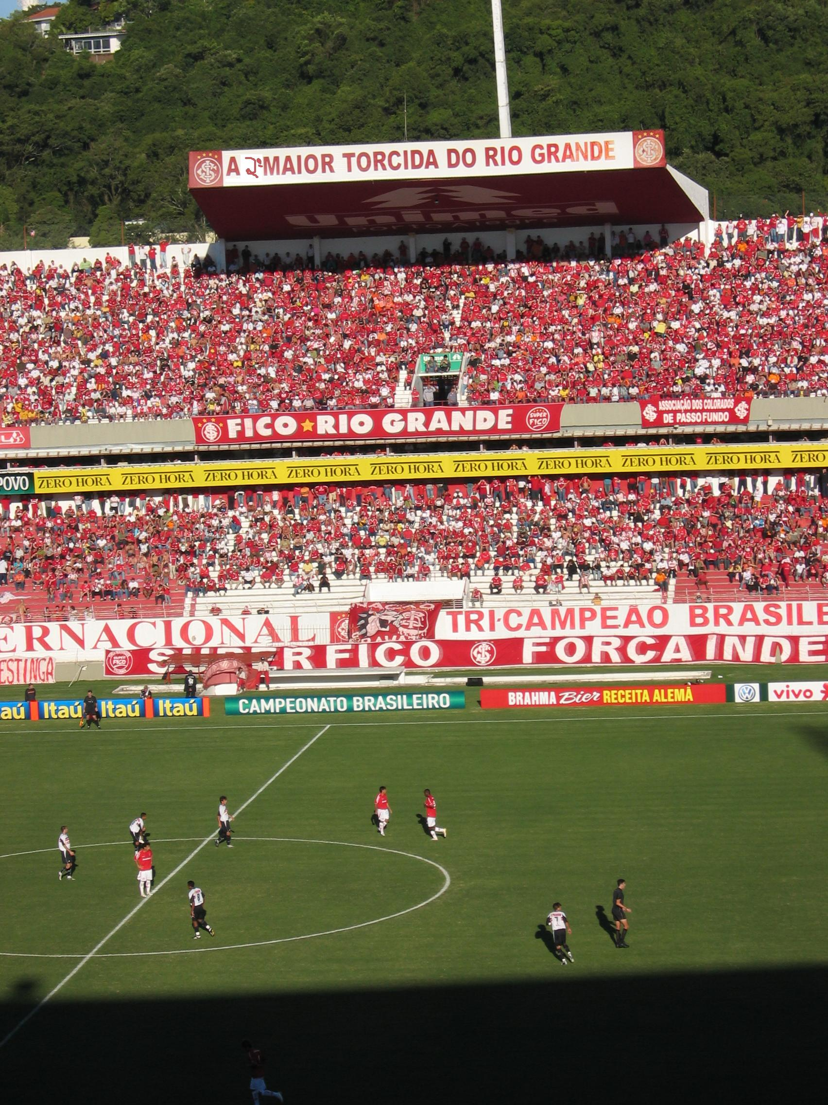 Estádio Beira-Rio